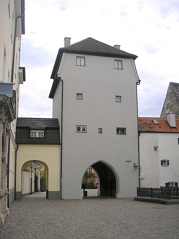 Landsberg am Lech (Oberbayern). Das „Färbertor“ von Westen. Eigene Aufnahme, Okt. 2006 / Landsberg am Lech (Upper Bavaria, Germany). The “Faerbertor” gate, looking east. Own photo, Oct. 2006.